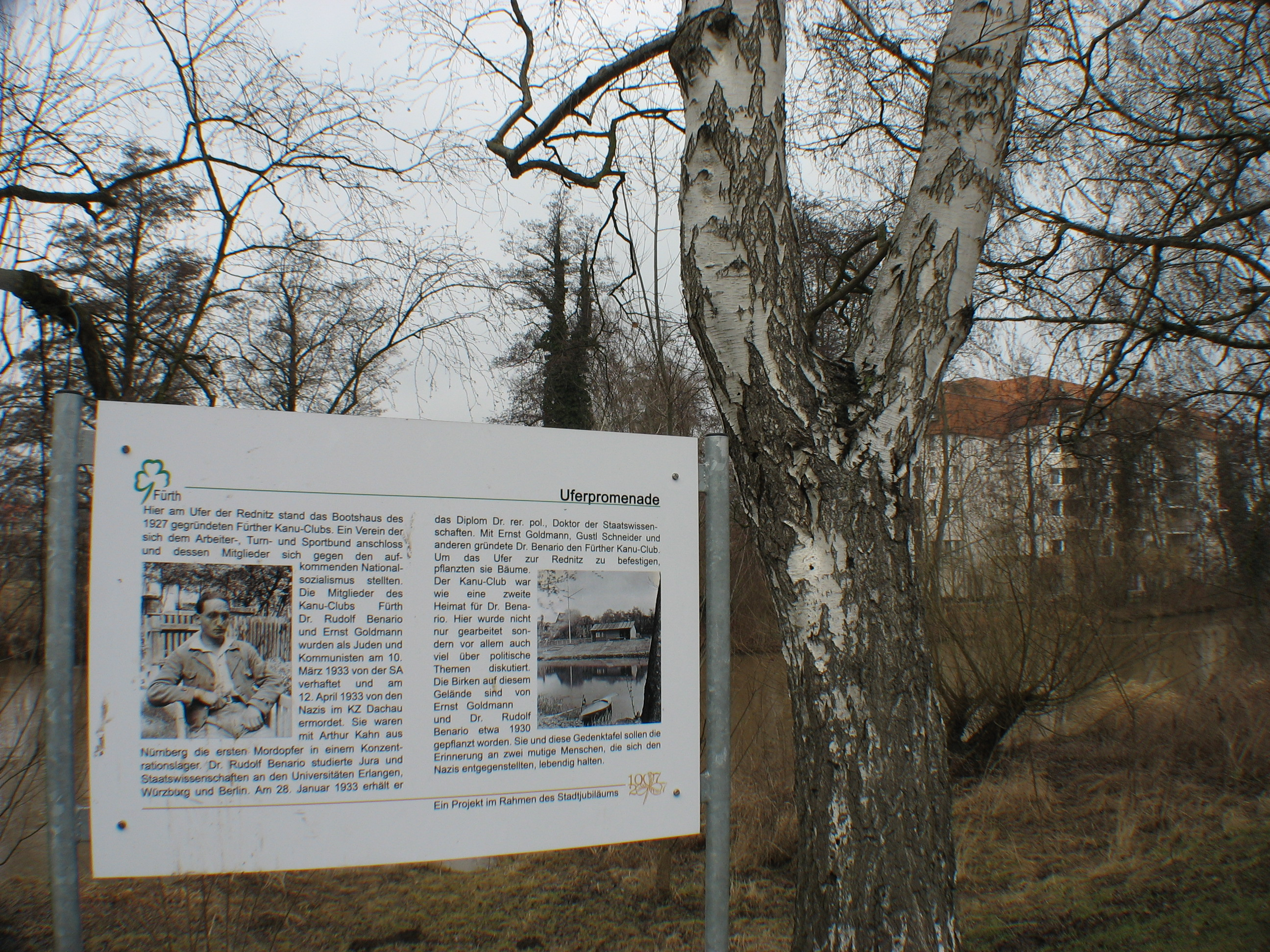 Gednktafel an Rudolf Benario, zusammen mit Ernst Goldmann das erste Fürther Opfer der Nationalsozialisten, evtl. der erste in einem KZ (Dachau) ermordete Jude überhaupt.